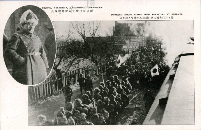 1931年9月18日事变后日军进占锦州的历史影像，出自1932年日本和歌山大正写真工艺所出版明信片《锦州方面活跃的皇军的威力》